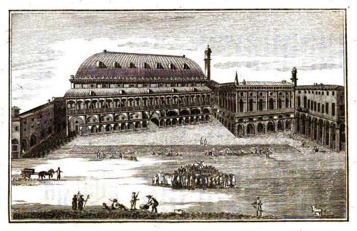 Piazza Erbe, Padua, on 1817